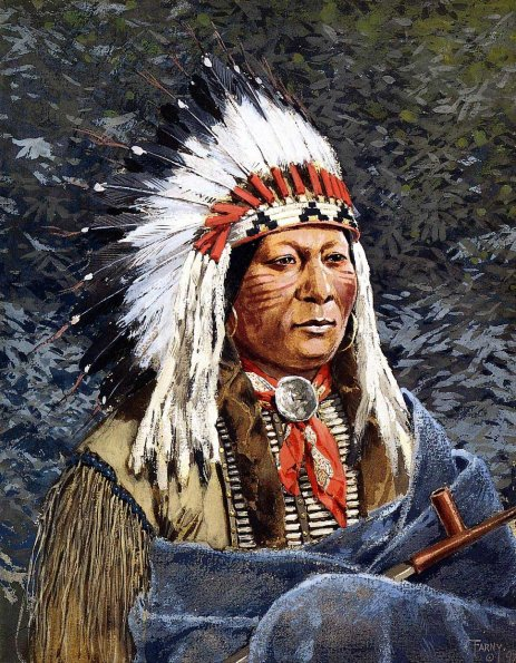 Chef sioux.